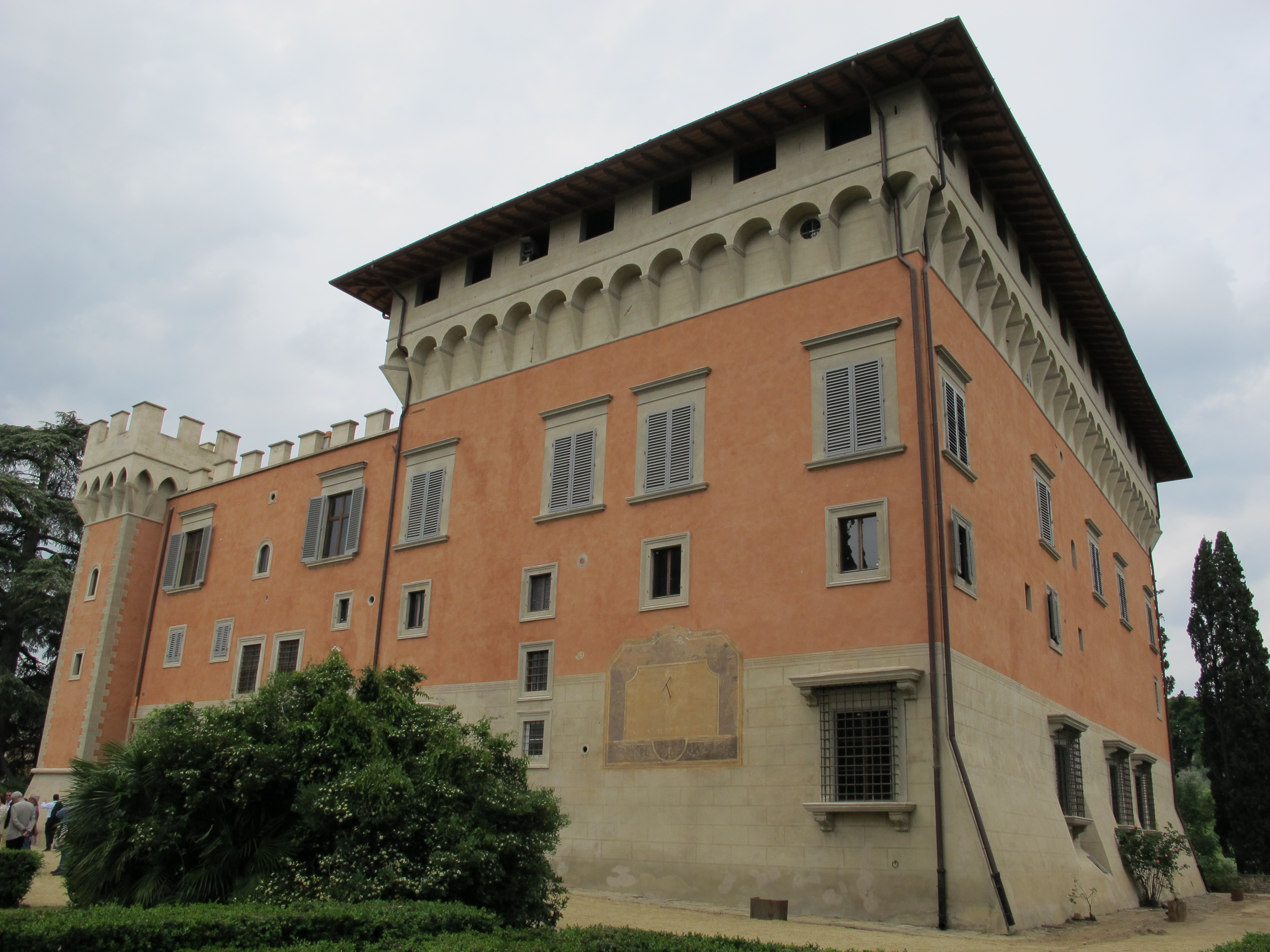 Villa salviati (dopo restauro)